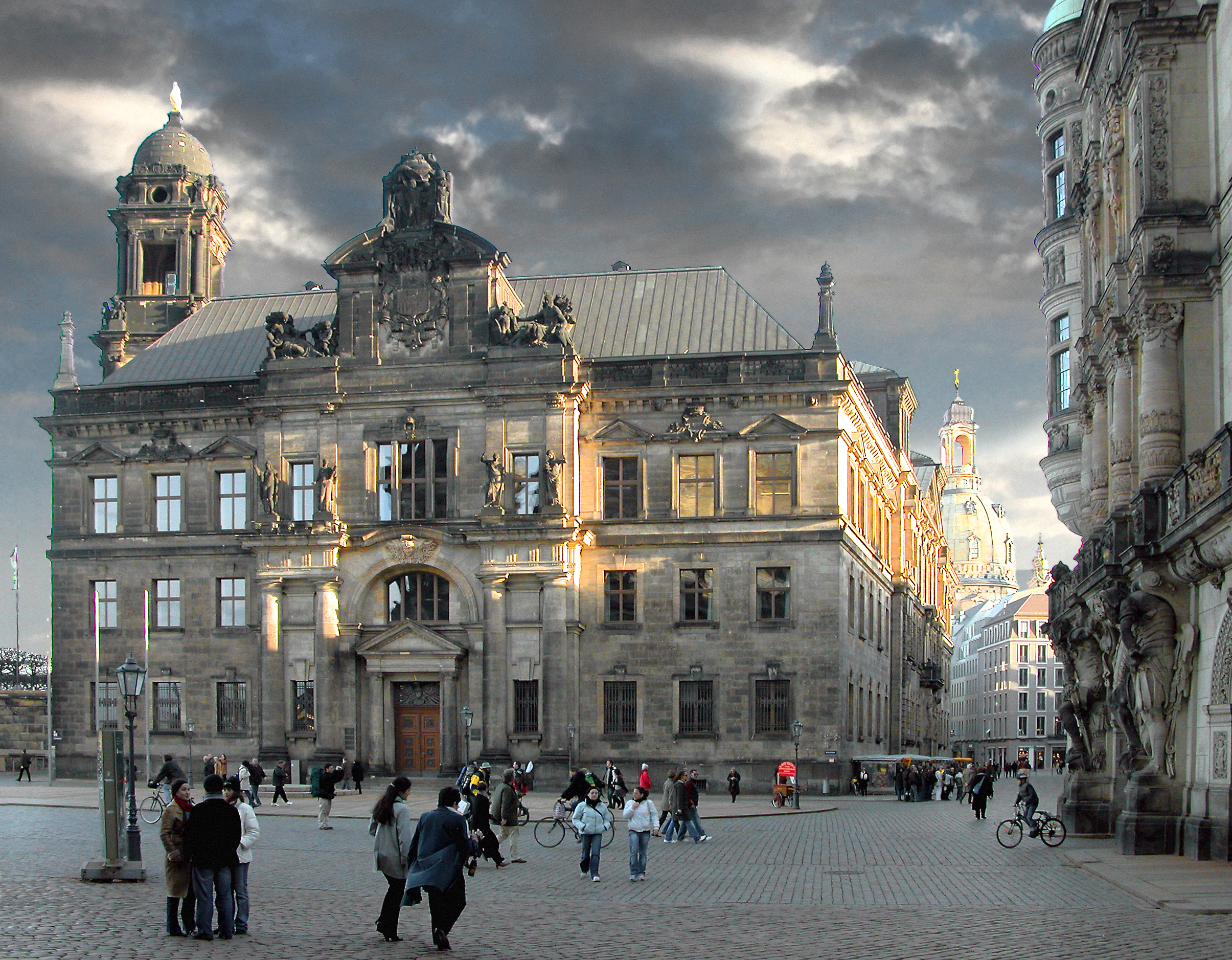 06.01.2007 01067 Dresden-Altstadt: Ständehaus (1901-1906 von P. Wallot) am Schloßplatz. Blick durch die Augustusstraße bis zur Frauenkirche. Rechts das Georgentor. [DSCN20400&20398&20022.TIF]20070106172DR.JPG(c)Blobelt